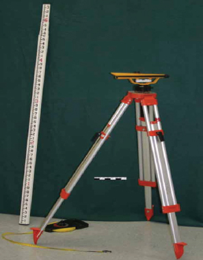 Mira y nivel topográfico